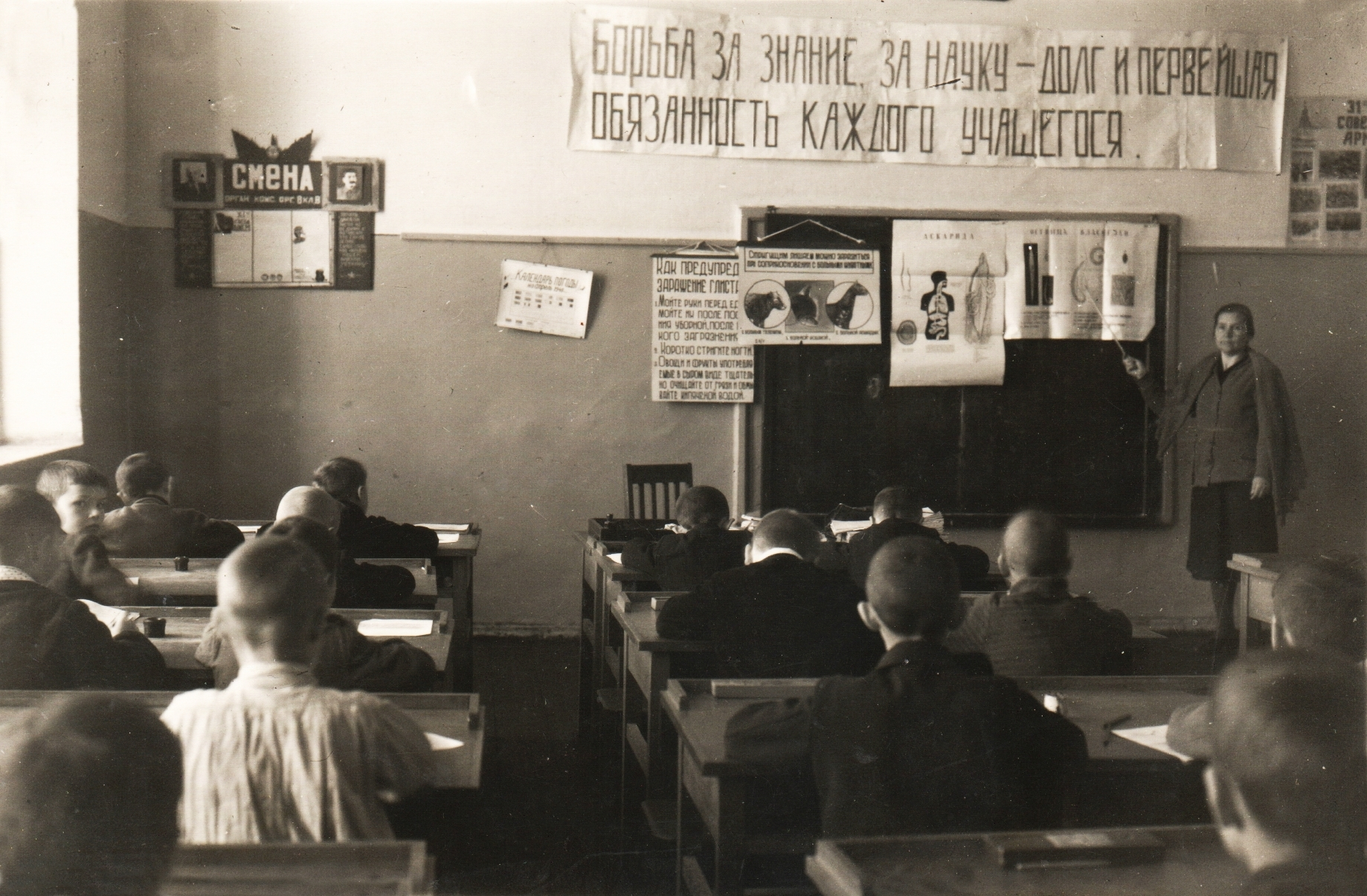 Урок в мужской начальной школе, Саратов, 1949 год. Урок проводит заслуженный учитель школ РСФСР, кавалер орденов Ленина и Трудового Красного Знамени Турова Любовь Ивановна